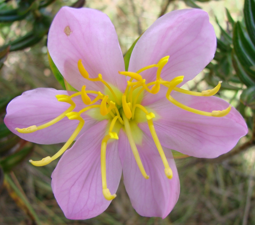 Lavoisiera grandiflora - Melastomataceae - Chapada Imperial - Distrito Federal - Brasil